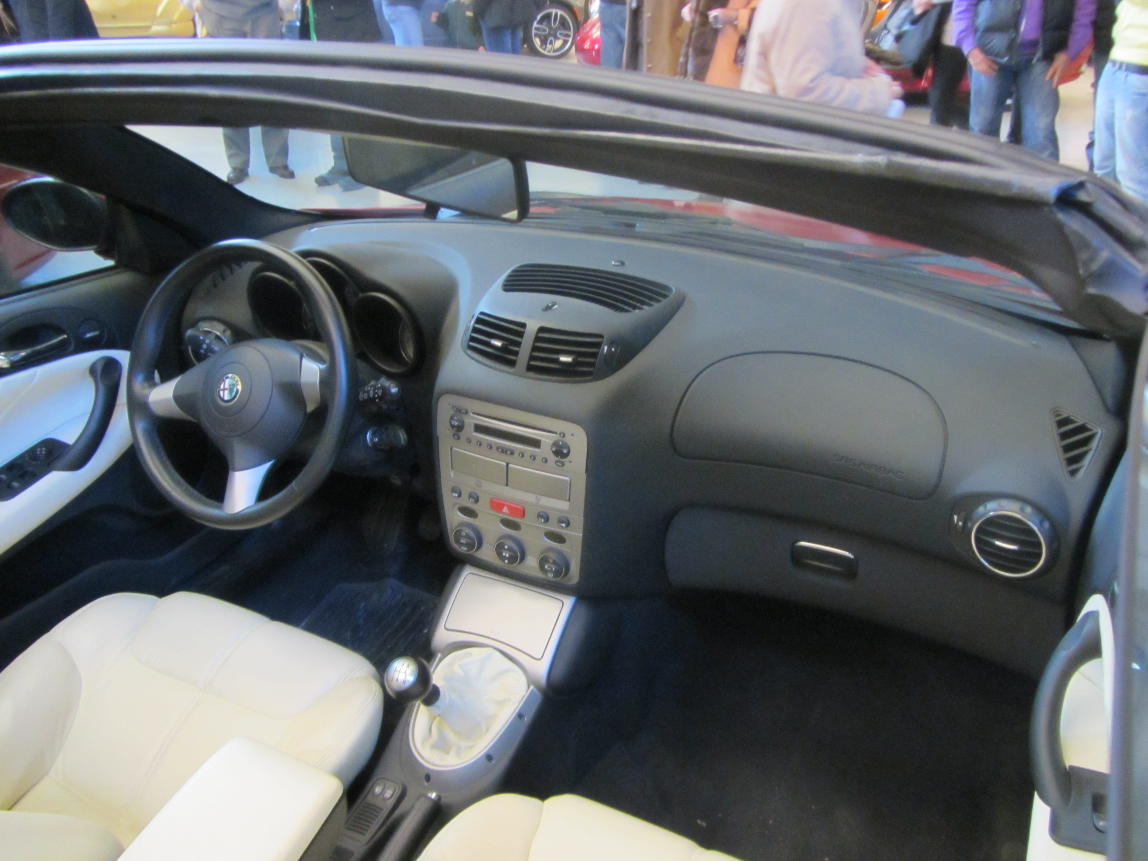 Alfa Romeo GT cabrio concept al Museo Bertone